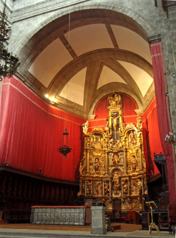 Catedral de Valladolid, (España). Capilla mayor, realizada en el segundo tercio del siglo XVII. En ella se encuentra el retablo de Juan de Juni (s. XVI), instalado aquí en 1922 y procedente de la iglesia de la Antigua de Valladolid, la sillería de coro, (principios del siglo XVII) procedente de la iglesia de San Pablo también en Valladolid y el altar con su frontal de platería barroco (S. XVIII).